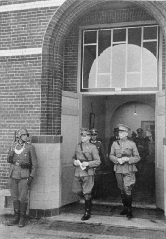 Der holländische General Winkelmann verlässt nach den Übergabeverhandlungen das Schulhaus. Holland, Rotterdam, 15.5.1940 Das Schulhaus ist in Rijsoord, südlich von Rotterdam Information added by Wikimedia users.